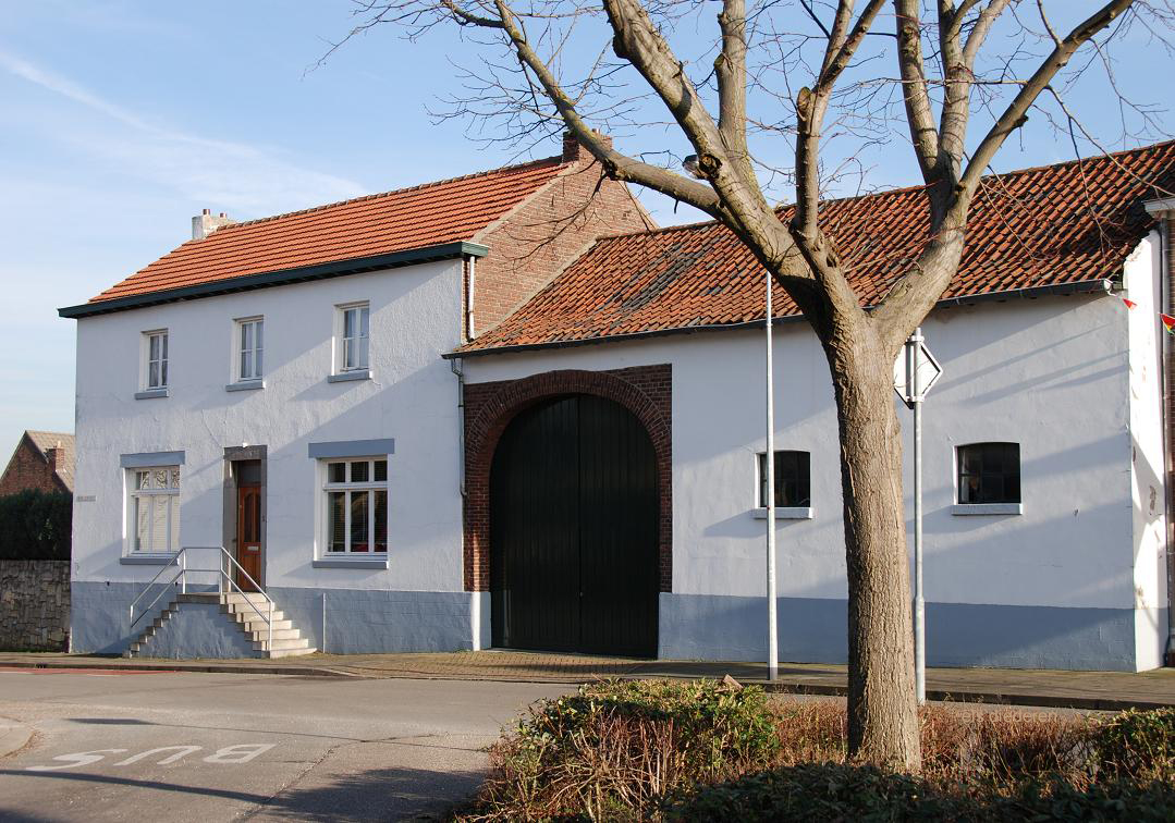 Heukelommerweg